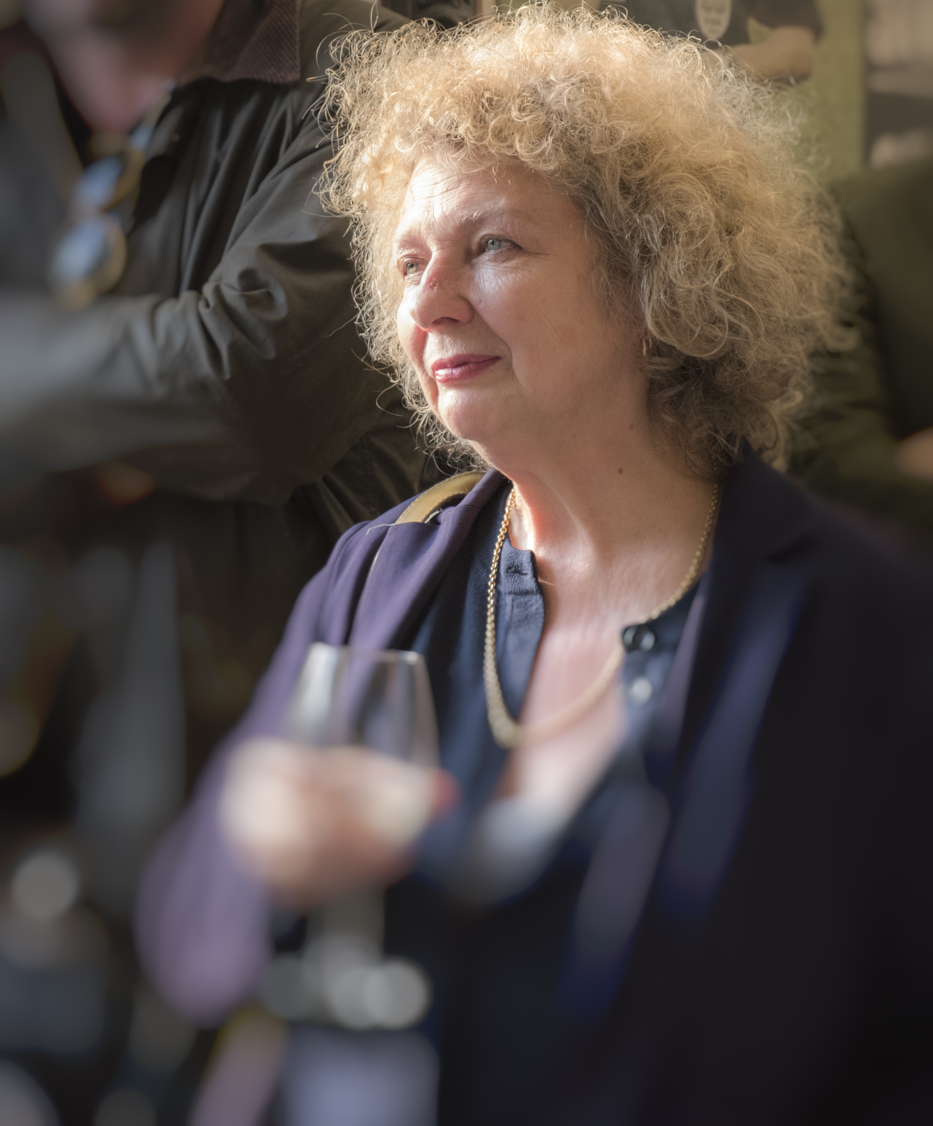 Marlene Dumas tijdens de opening van de tentoonstelling Personal Pop (kunstenaar Mohammed Shah Janan Miah) bij PartsProject te Den Haag op 18 februari 2018